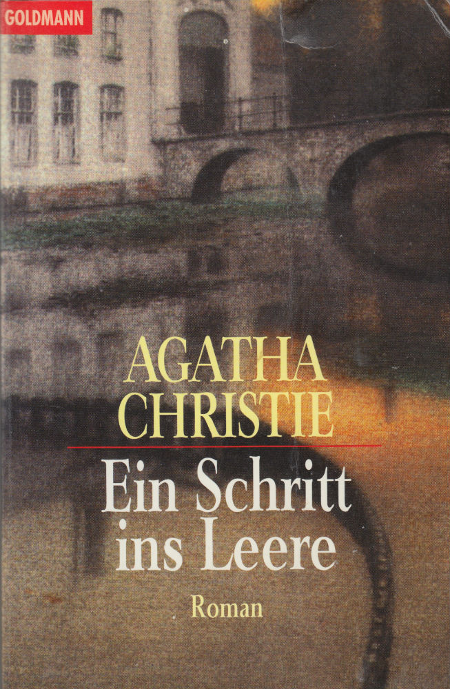 Agatha Christie: Ein Schritt ins Leere. Goldmann Verlag, München 1997. DNB